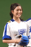 蜂谷晏海です。